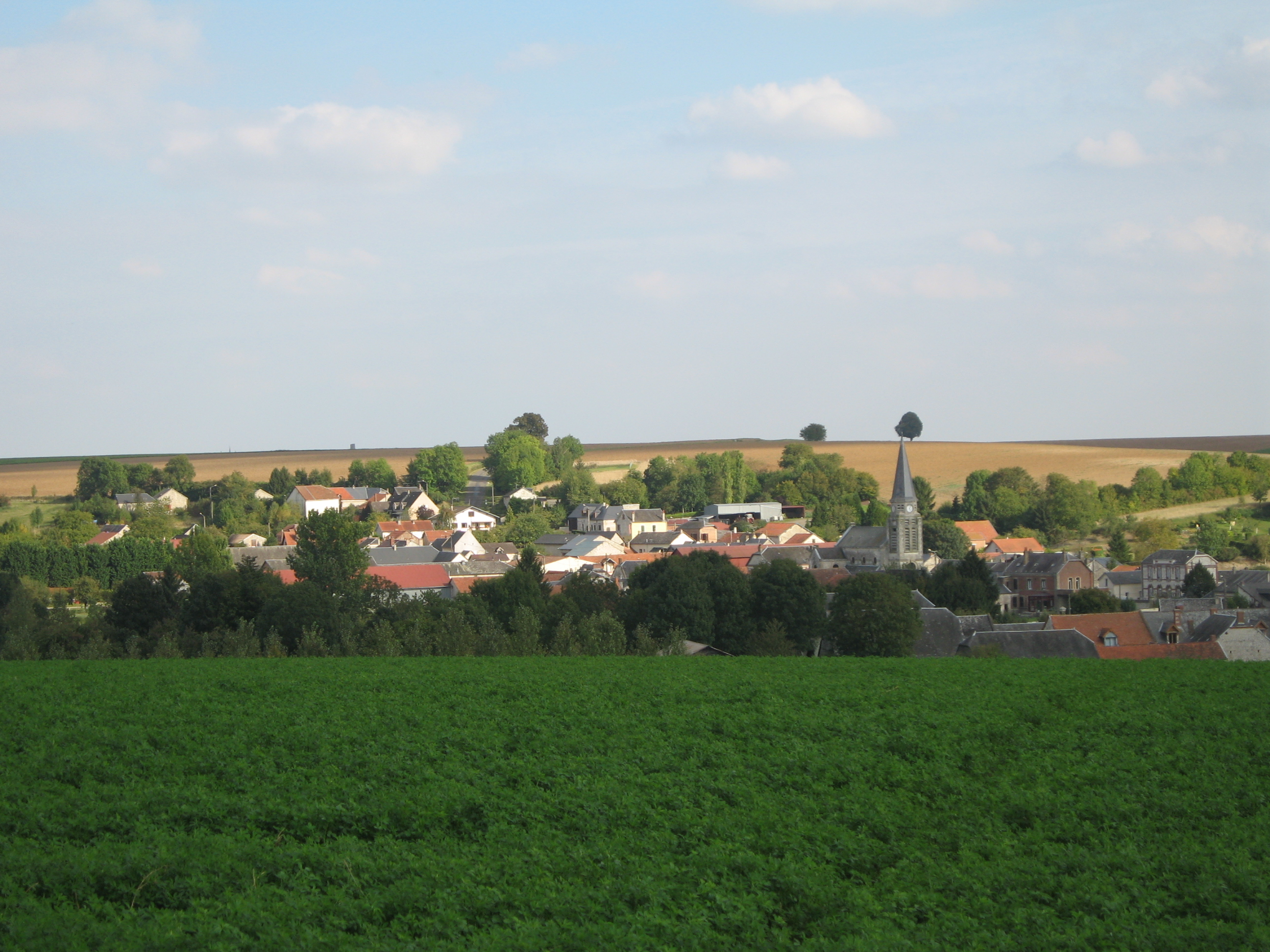 Vue du village.